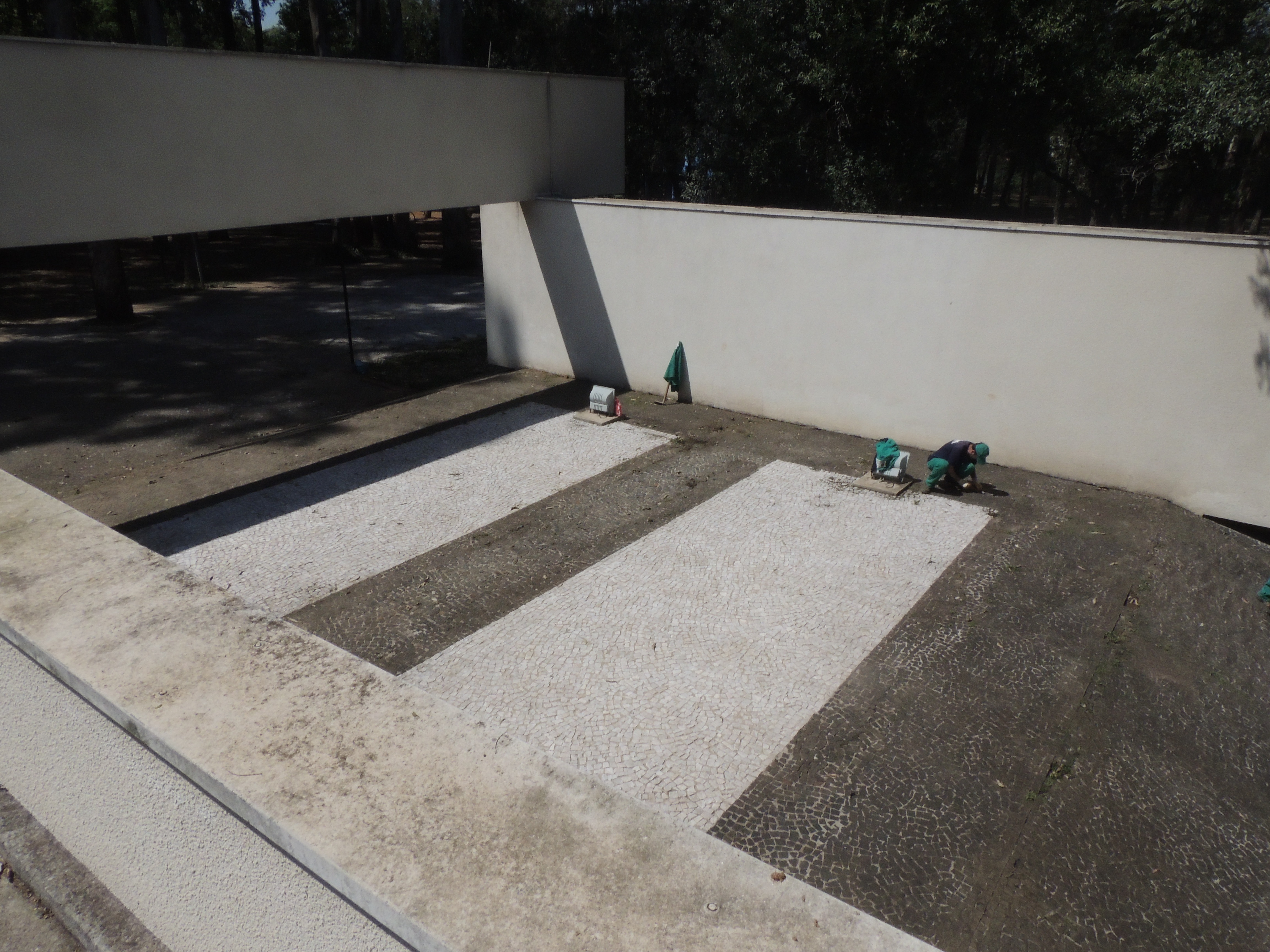 Pátio frontal da Escola Municipal de Astrofísica Professor Aristóteles Orsini em foto feita em seu telhado